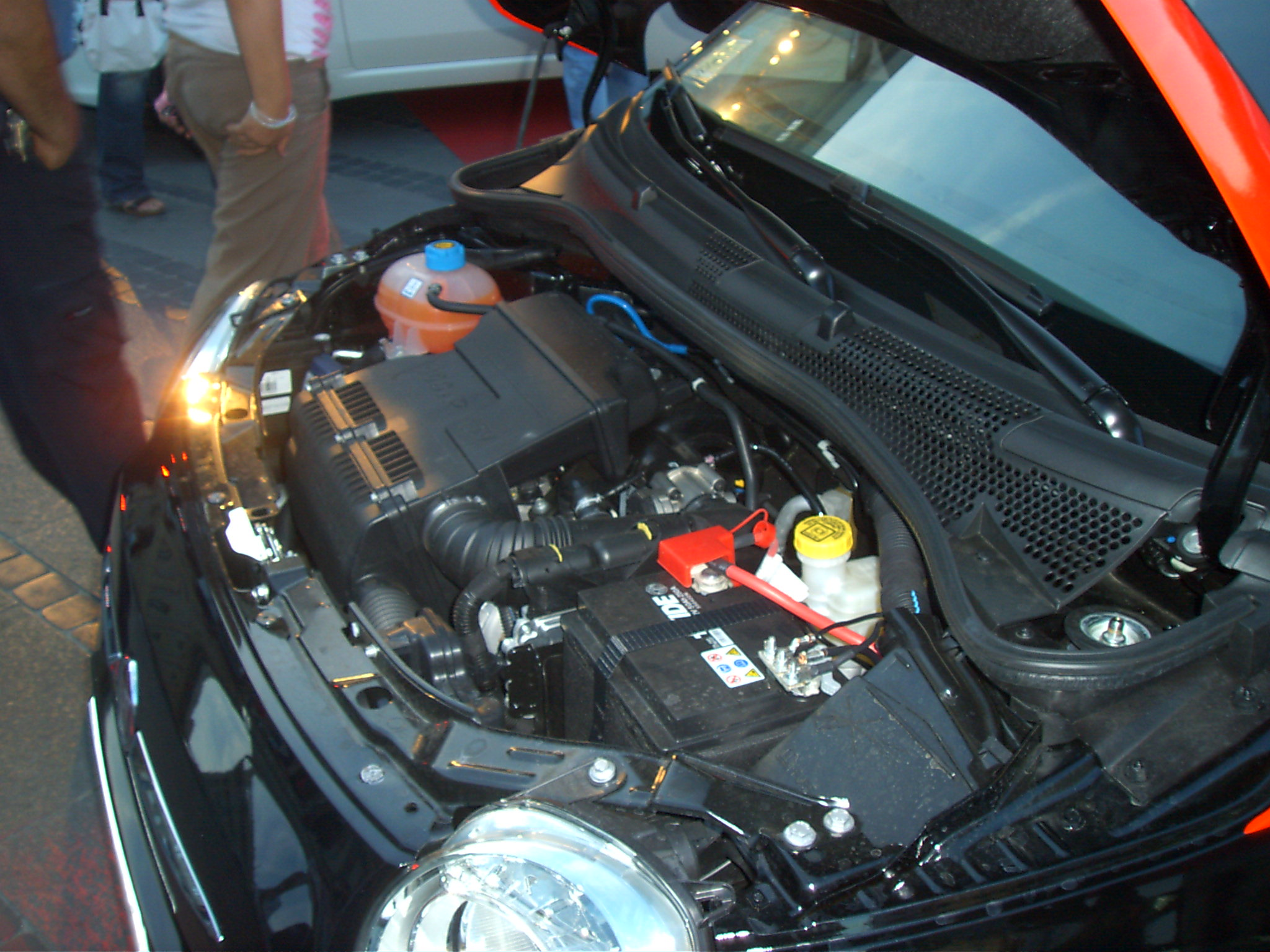 la nuova 500 Fiat viene presentata a Genova/vano motore